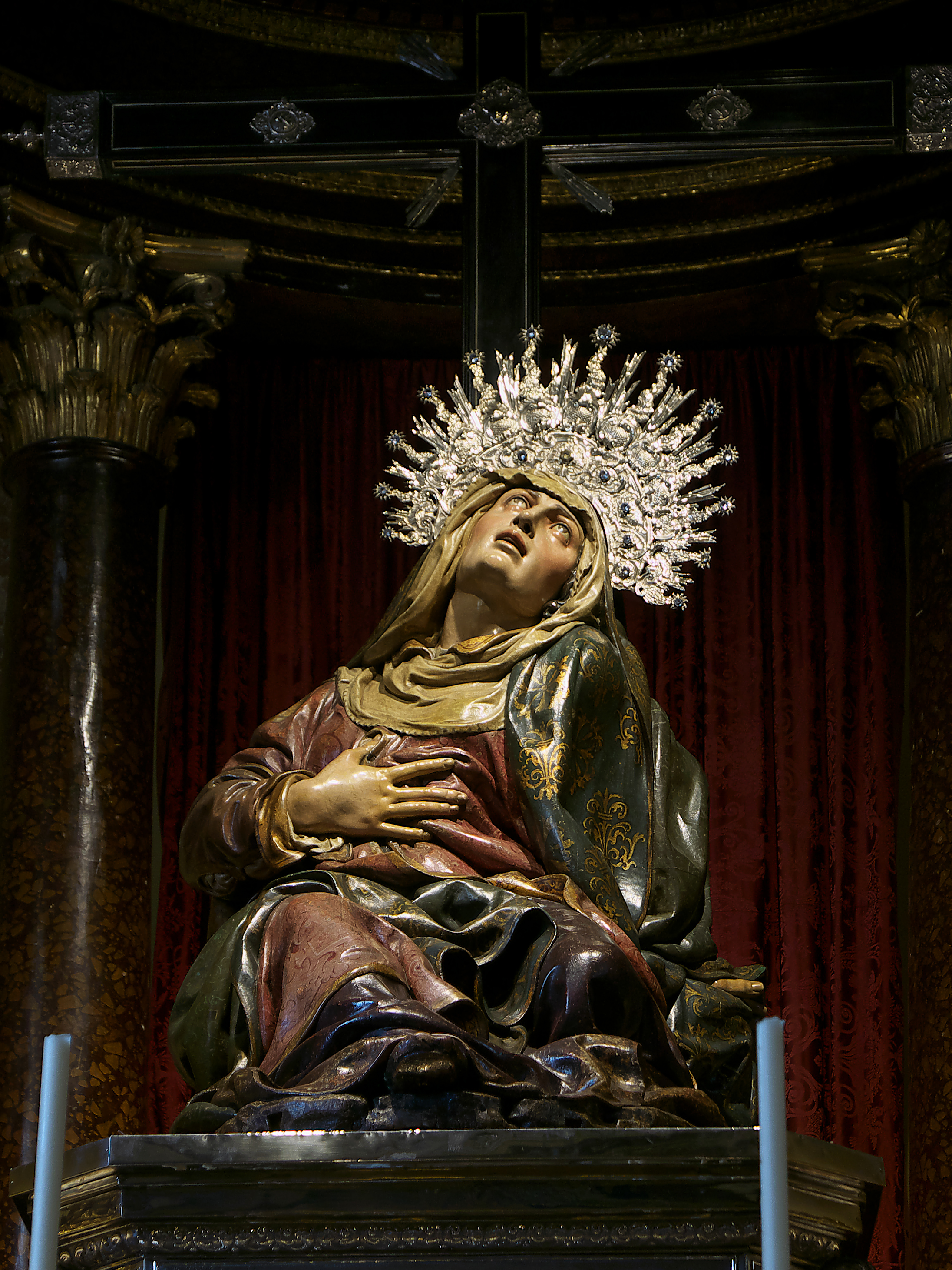 Iglesia Penitencial de Nuestra de las Angustias (Valladolid). Imagen de Juan de Juni (ca. 1571), titular de la Ilustre Cofradía Penitencial de Nuestra Señora de las Angustias, Valladolid.